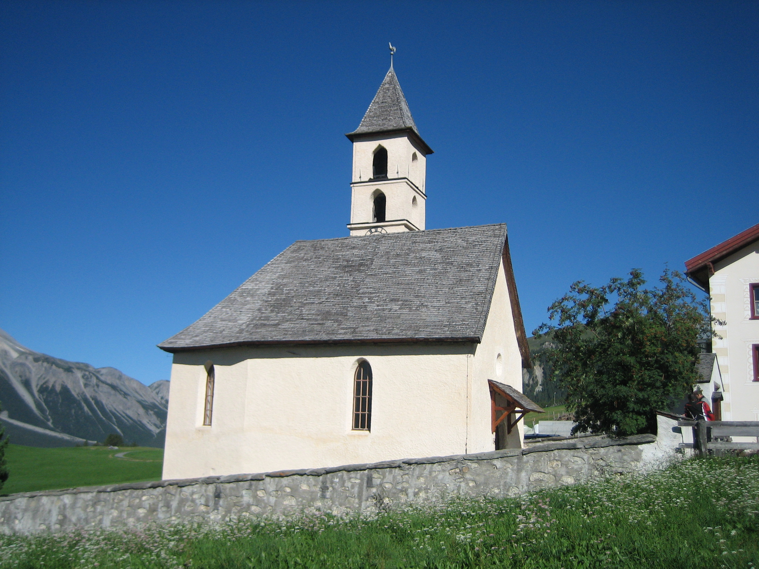 Lü